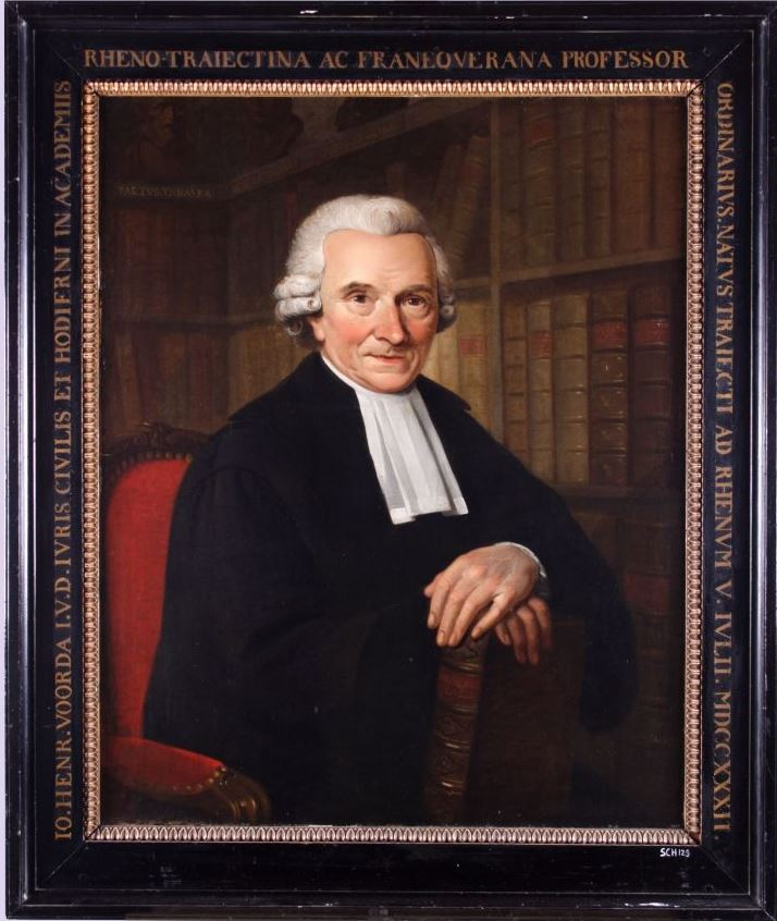 Portret in olieverf van Johannes Henricus Voorda, professor rechten aan de Franeker universiteit van 1797 tot 1802. Voorda staat afbeeld in een toga met witte bef en hij draagt een korte grijze pruik. Hij zit in een leunstoel en de beide handen rusten op een boek. Johannes Henricus Voorda (Utrecht 8 juli 1732 - Leeuwarden 29 maart 1814) studeerde in Utrecht en Leiden. Hij vestigde zich als advocaat in Leeuwarden en werd lid van de Staten van Friesland. Na enkele jaren volgde een benoeming als hoogleraar in de rechten in Utrecht. (Tekst: Museum Martena)